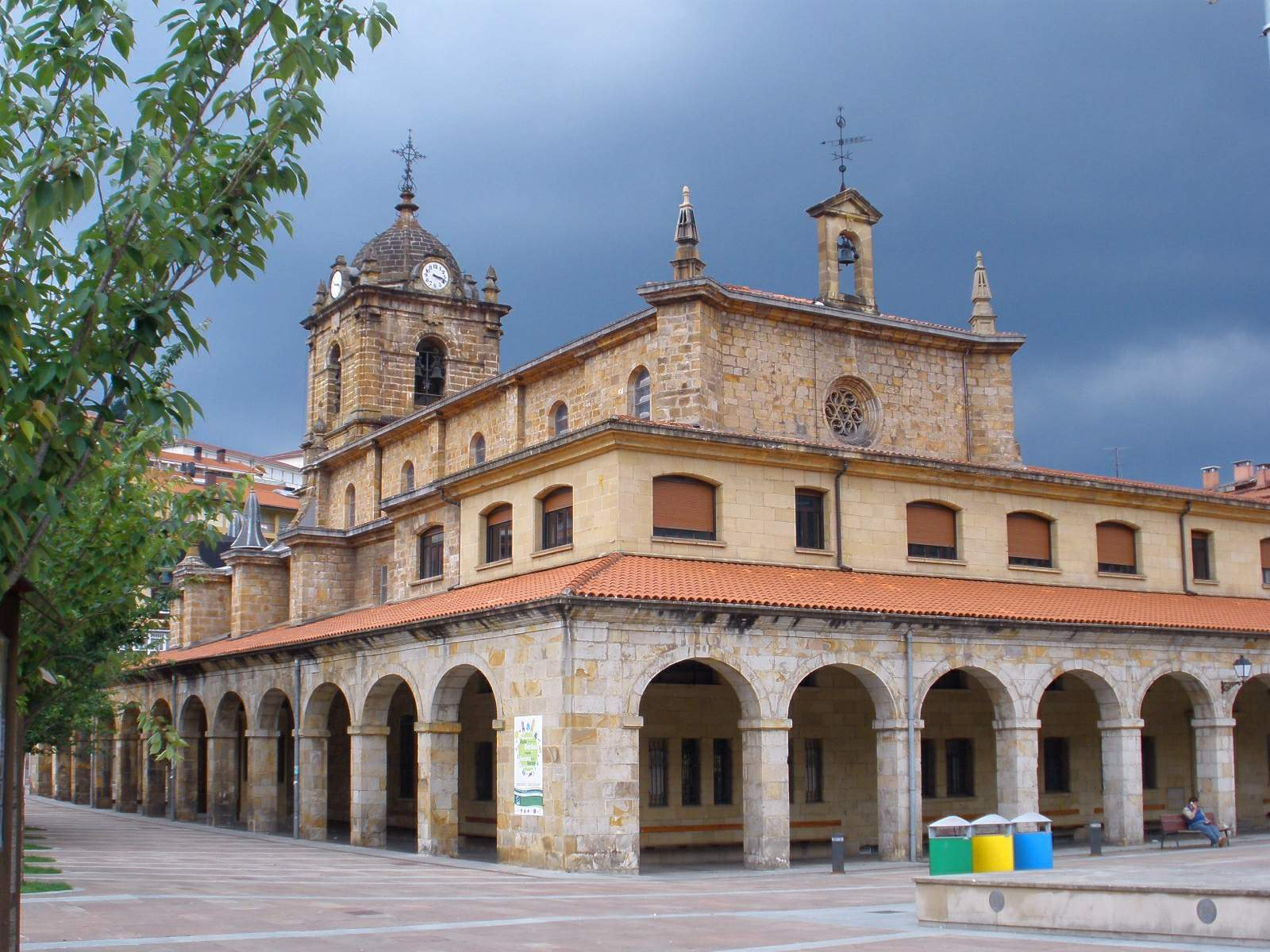 Church of Nuestra Señora de la Asunción, Legazpi (Gipuzkoa, Spain)